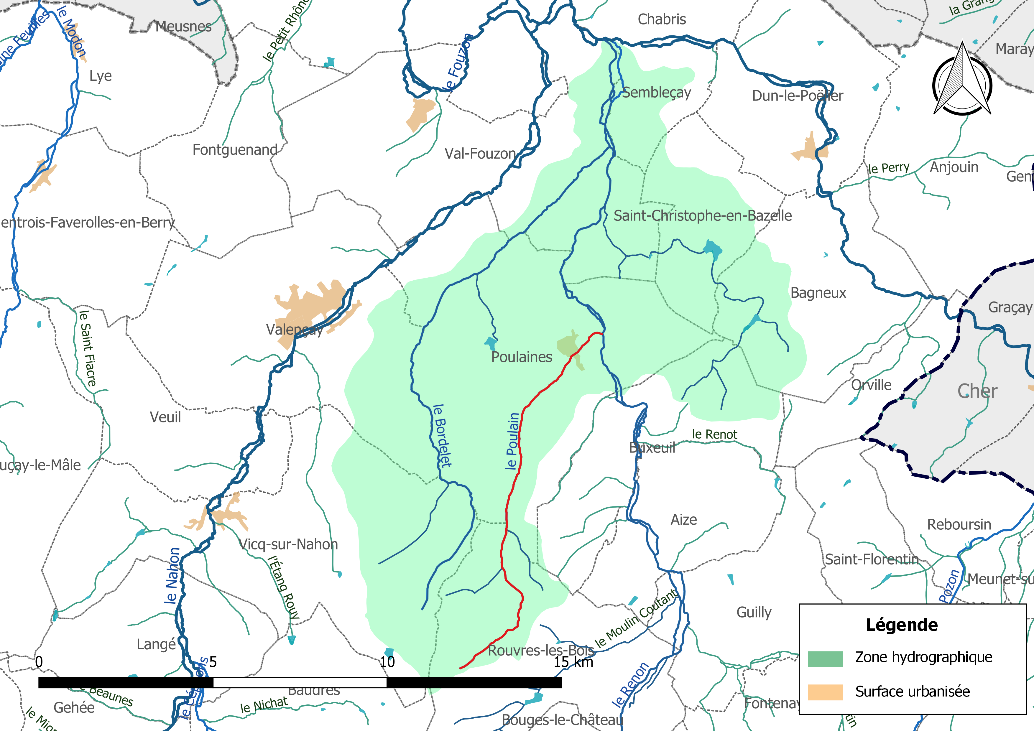 Carte du cours d'eau « le Poulain » (France) et de la zone hydrographique dans laquelle il s'insère.